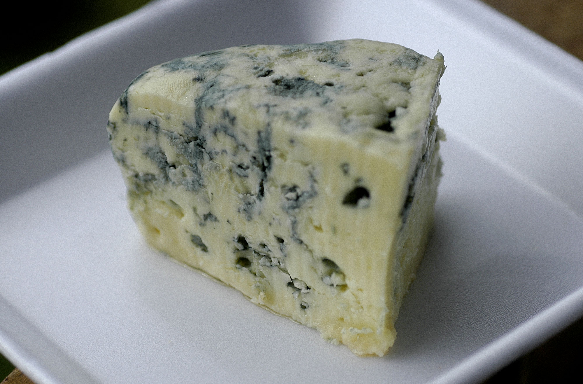 Queijo gorgonzola